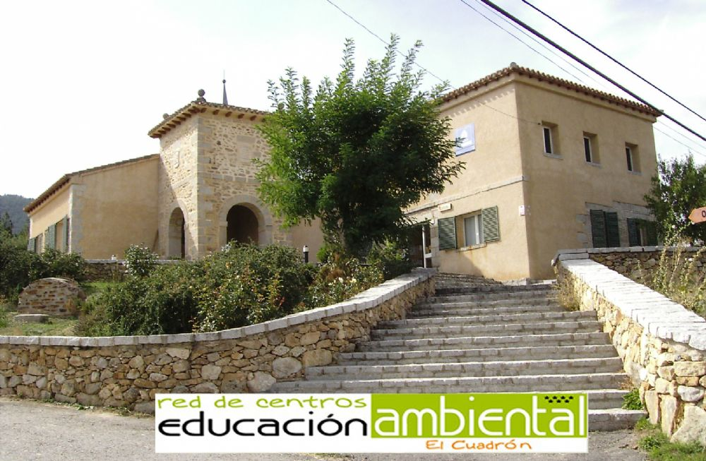 Fachada